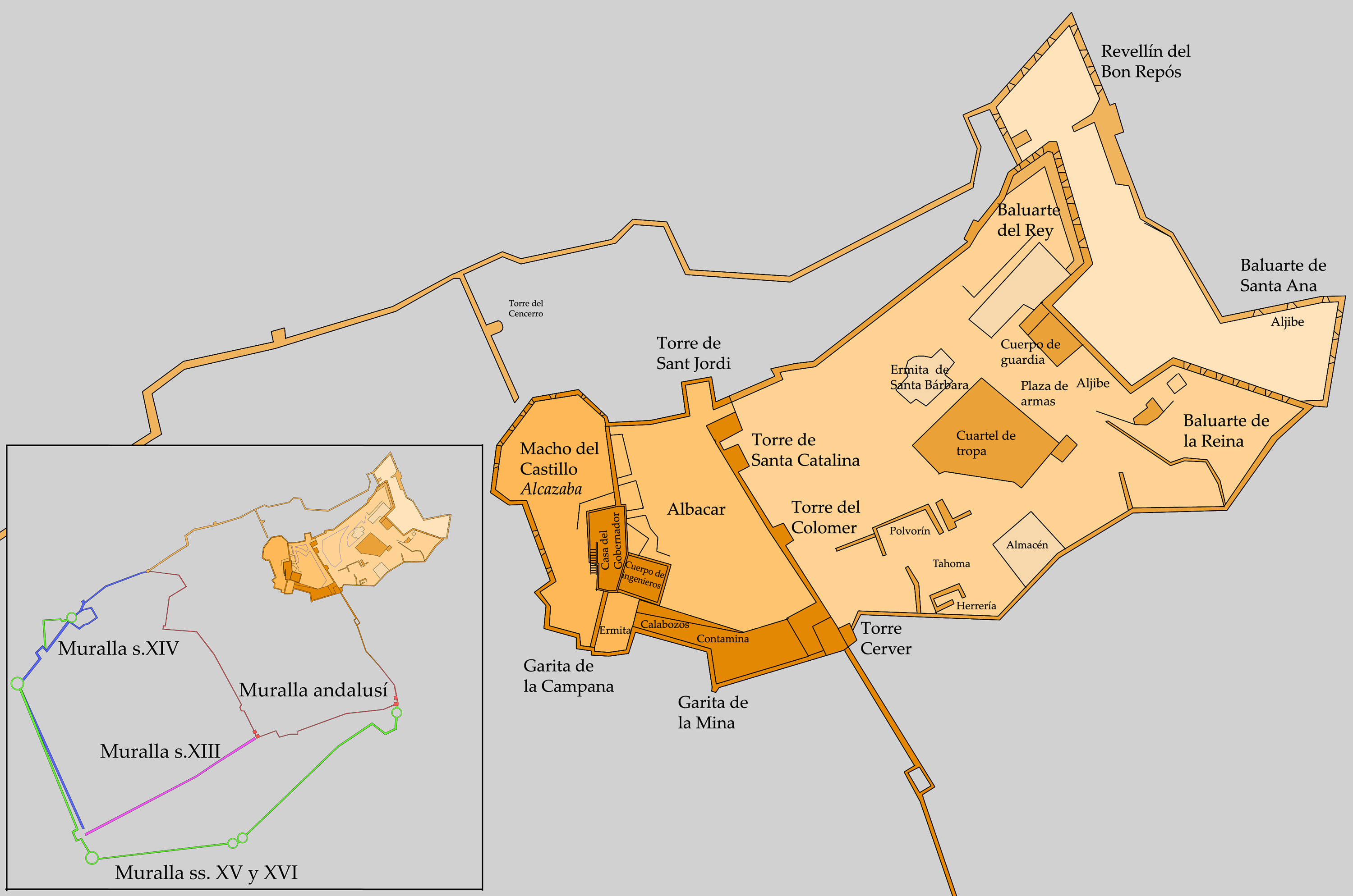 Plano del Castillo de Santa Bárbara de Alicante donde se indican sus principales elementos arquitectónicos. Se adjunta también un plan con las diferentes líneas de murallas de la ciudad en relación al castillo. Alicante, Comunidad Valenciana, España.